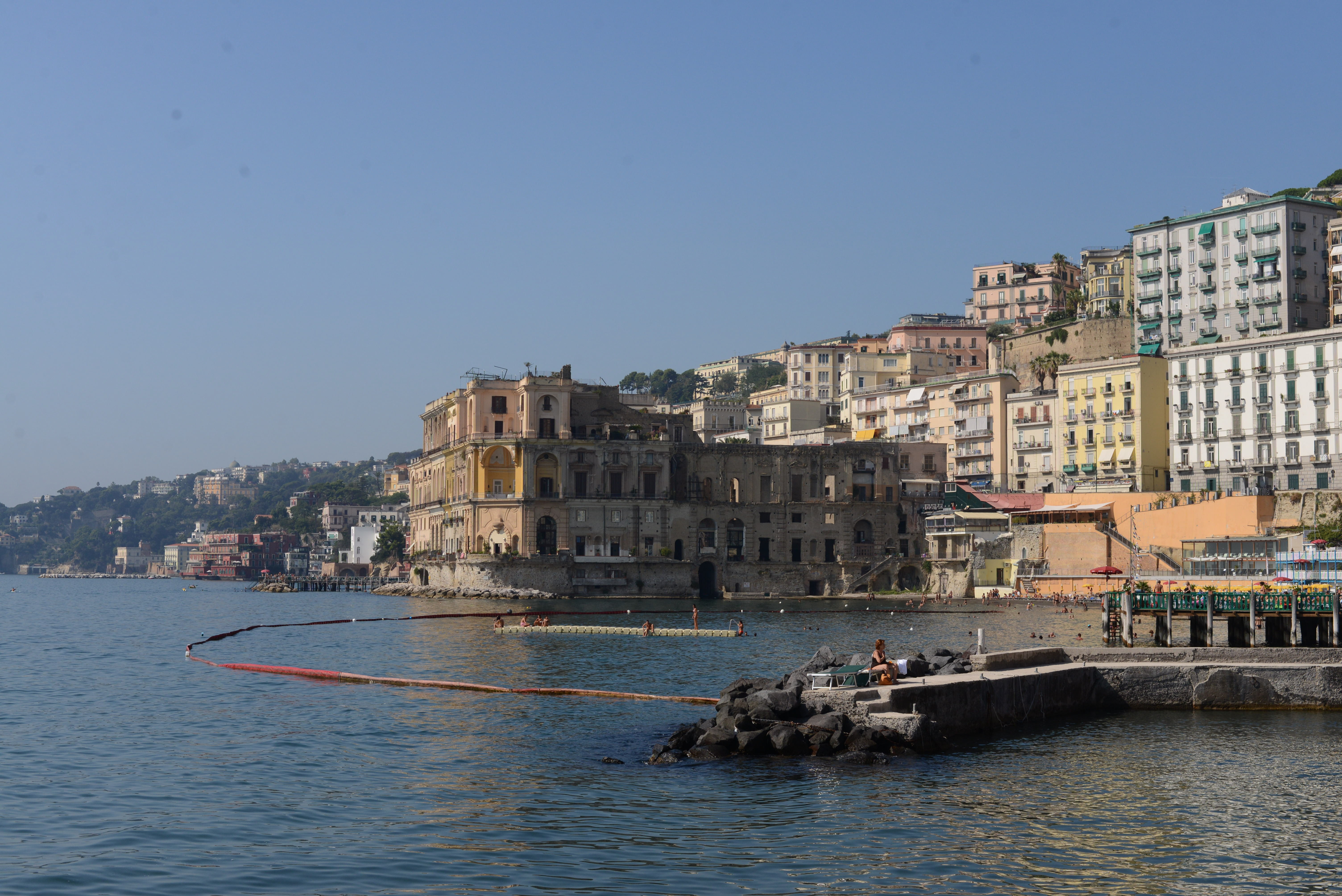 Palazzo Donn'Anna e bagno Elena